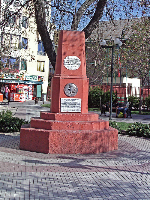 Monumento actual, en San Pablo con Almirante Barroso.